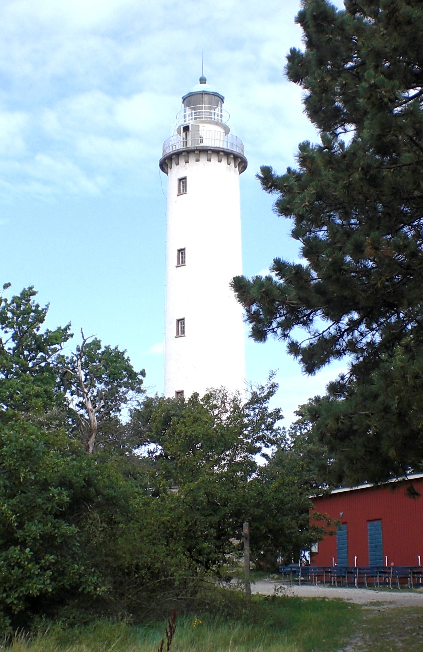 Leuchtturm Lange Erik auf Öland, Schweden